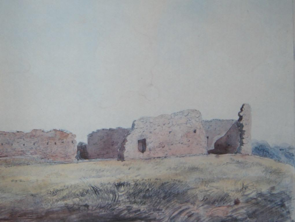 Беларуская (тарашкевіца): Краслаў (Krasłaŭ). Руіны замка